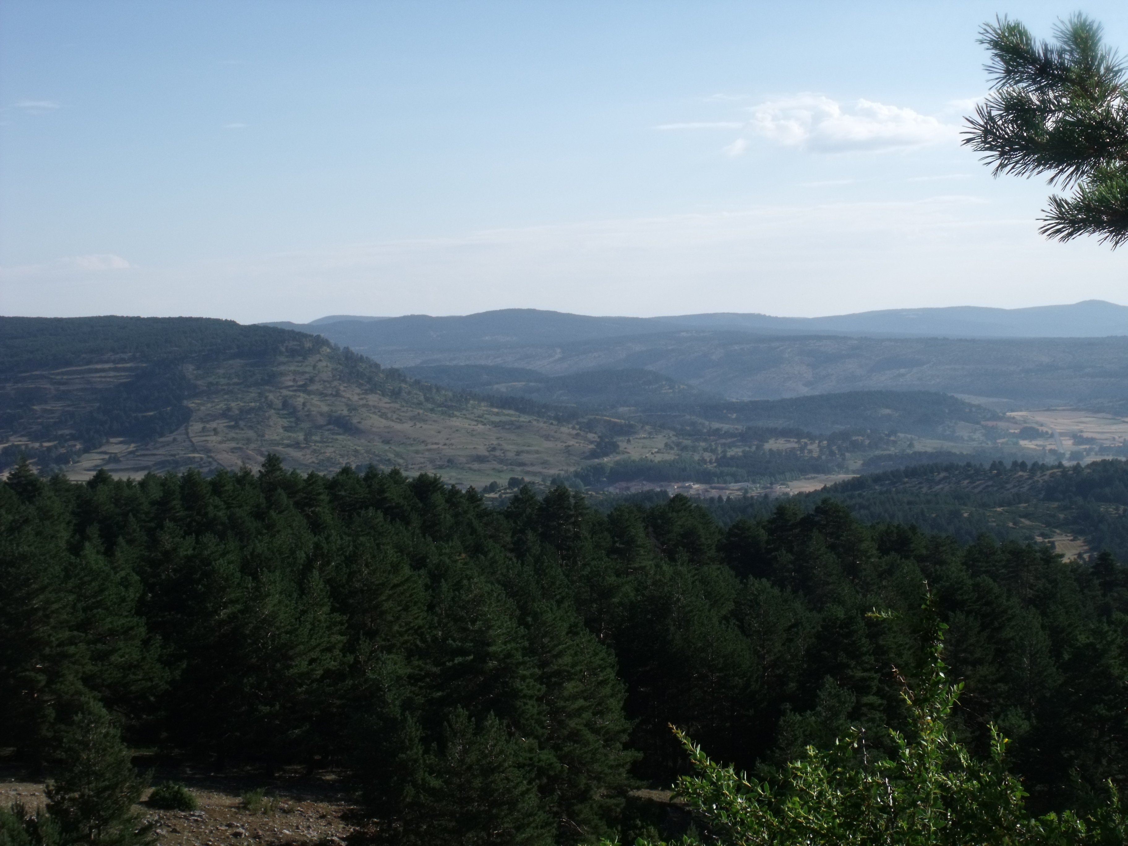 Vistas desde el puerto de El Portillo. 1790 metros sobre el nivel del mar.